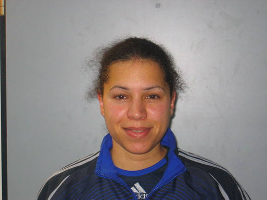 Jennifer Meier